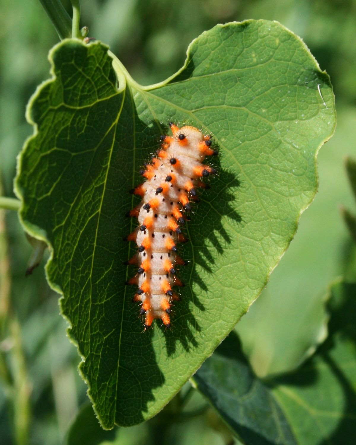 Osterluzeifalter (Zerynthia polyxena), Raupe/caterpillar, Ritterfalter (Papilionidae), auf Aristolochia clematitis, Aristolochiaceae – Österreich/Austria/Autriche: Niederösterreich, Alpenostrand, NW Pfaffstätten